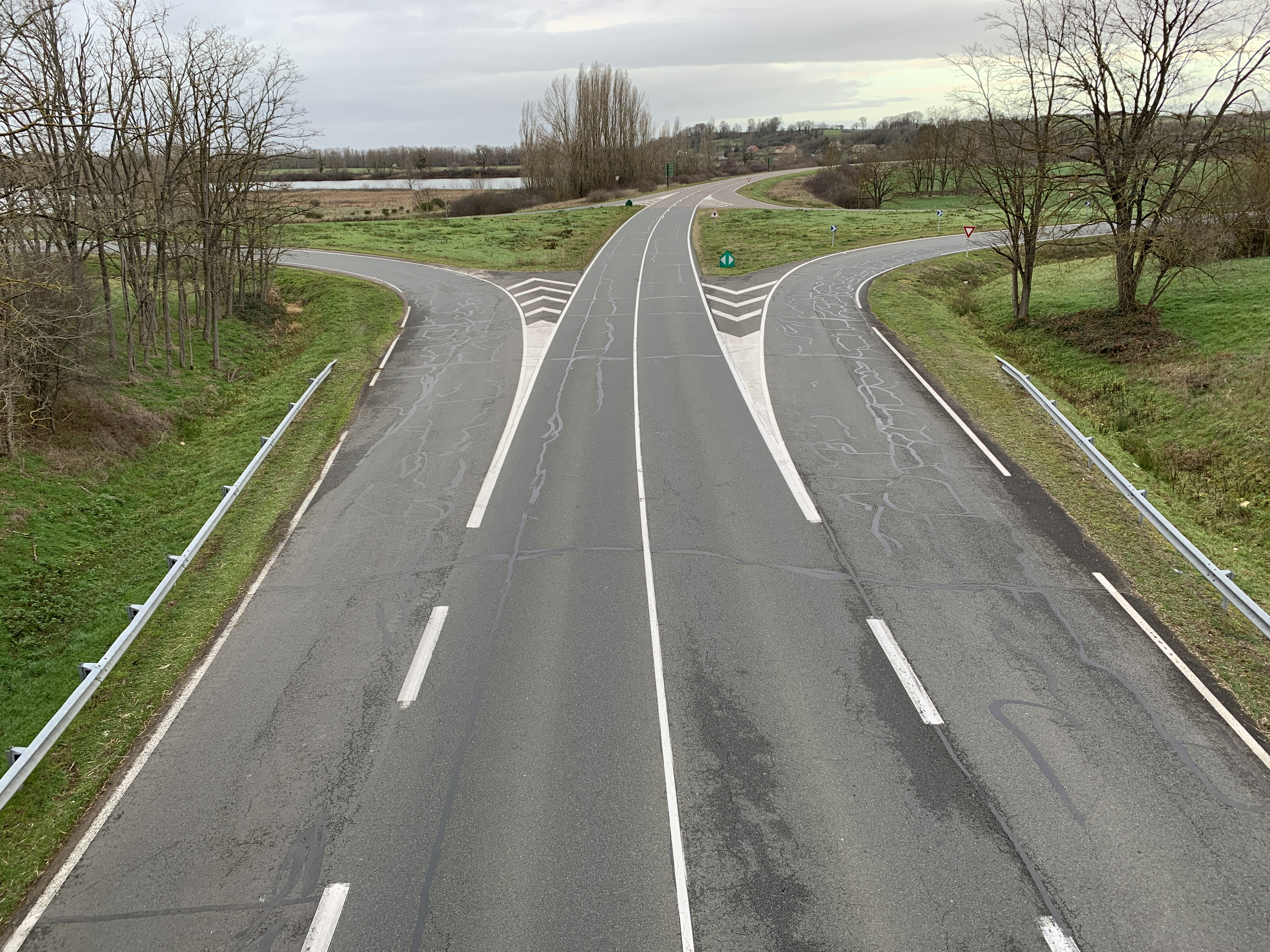 Route D982 en direction de Paray-le-Monial, Marcigny.